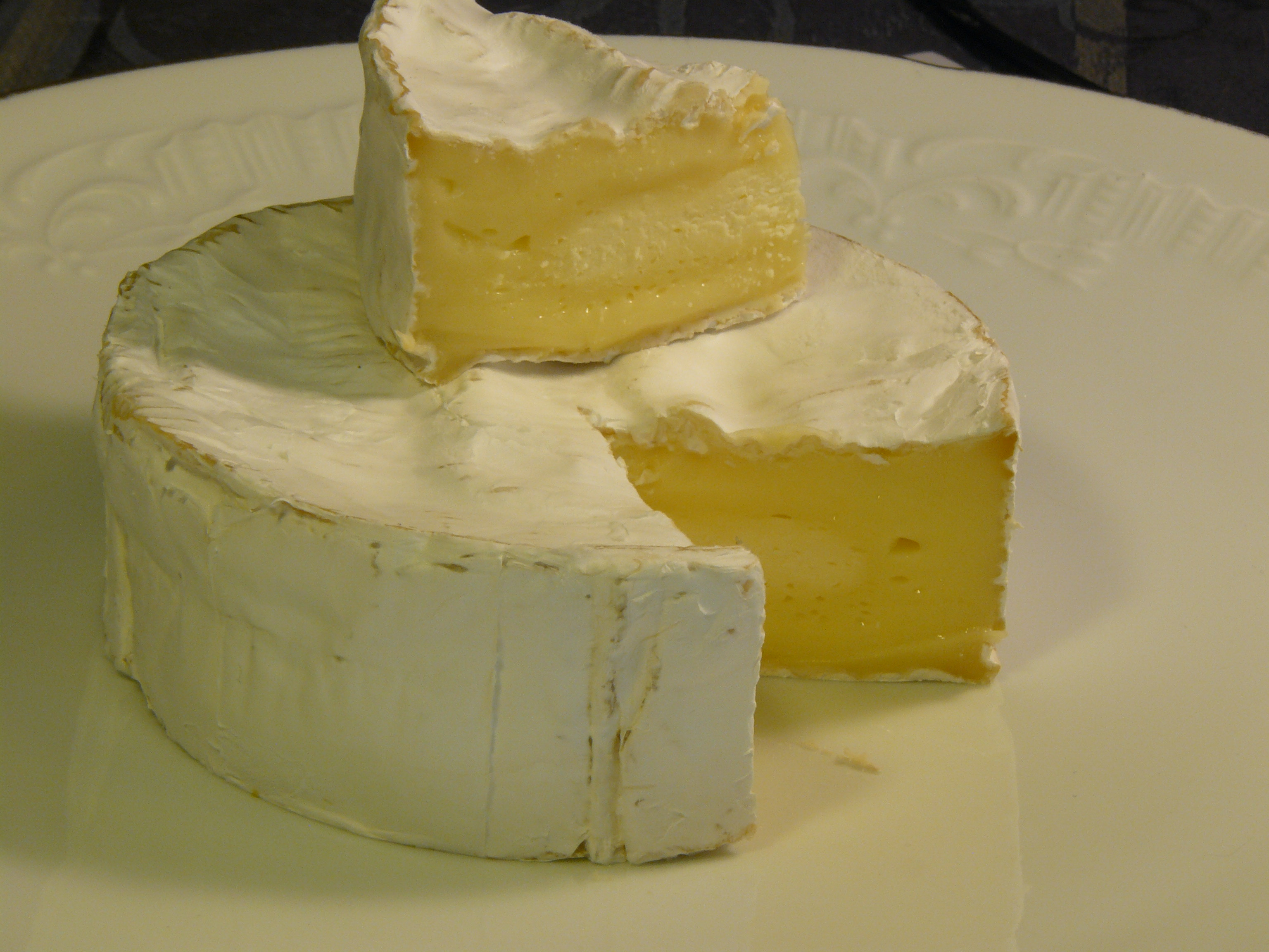 Camembert de Normandie Bonchoix, photographié pendant le WikiFromage Lyonnais.